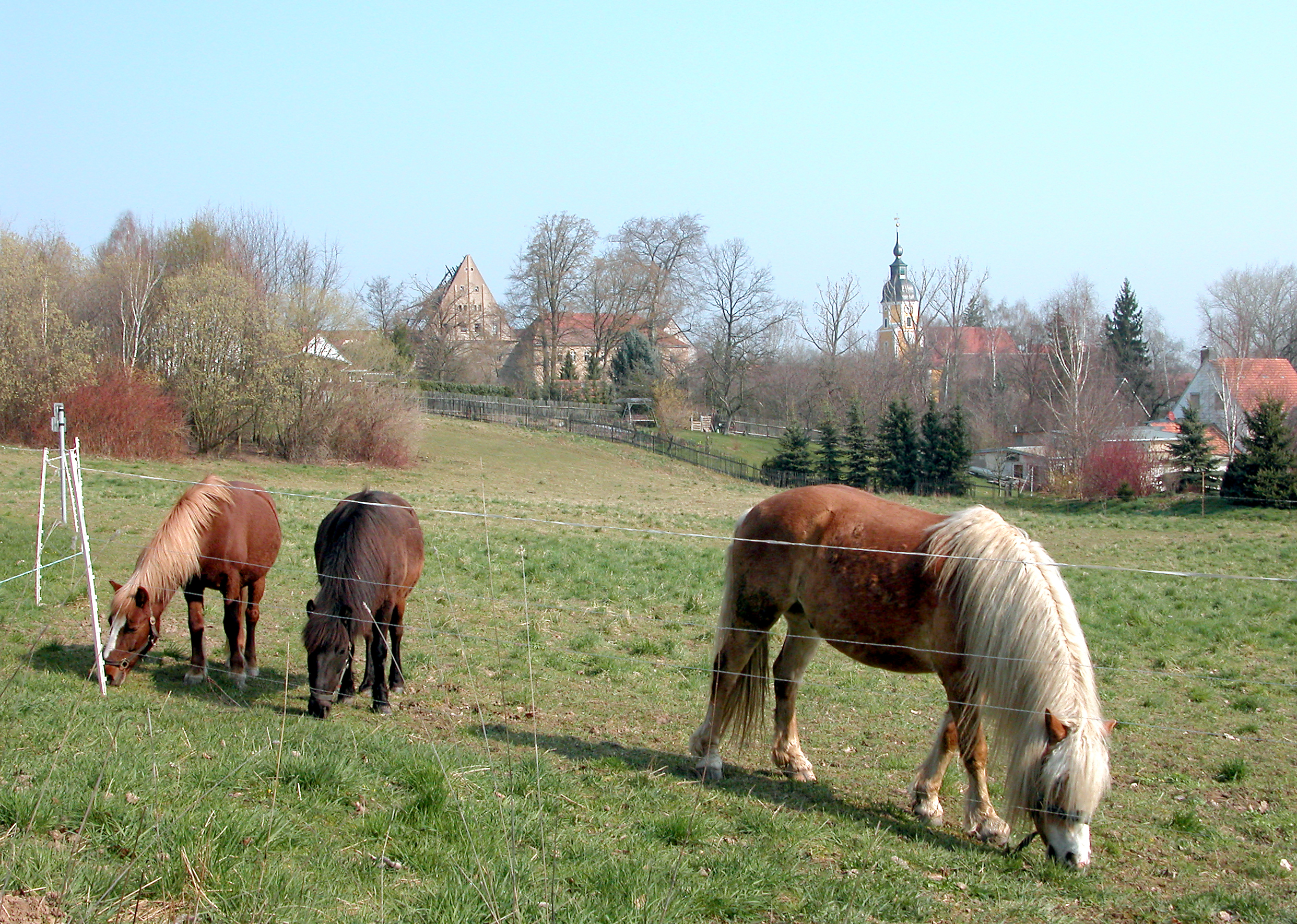 30.03.2007 01683 Deutschenbora (Nossen): Blick zum Rittergut mit dem 2001 abgebrannten Herrenhaus (links) und der Kirche. [DSCN21704.TIF]20070330080DR.JPG(c)Blobelt